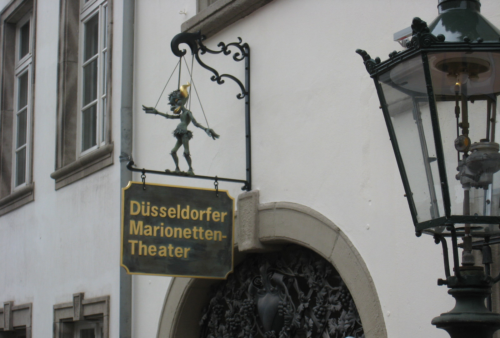 Toreingang mit Theaterschild Düsseldorfer Marionetten-Theater mit Figur Puck, Bilker Straße 7, Palais Wittgenstein, Düsseldorf